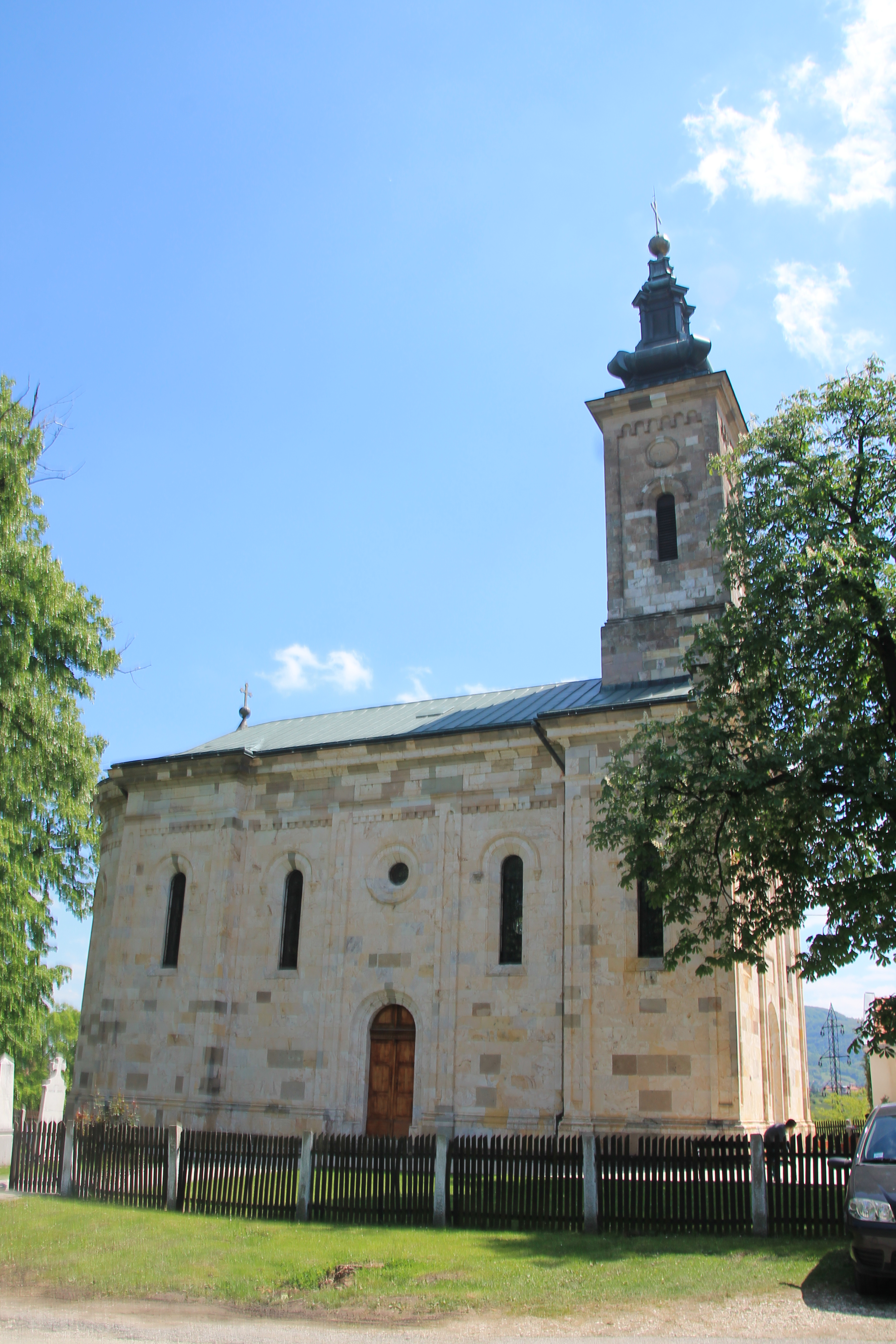 Crkva Sv. arhangela Gavrila (Aranđelovac grad)